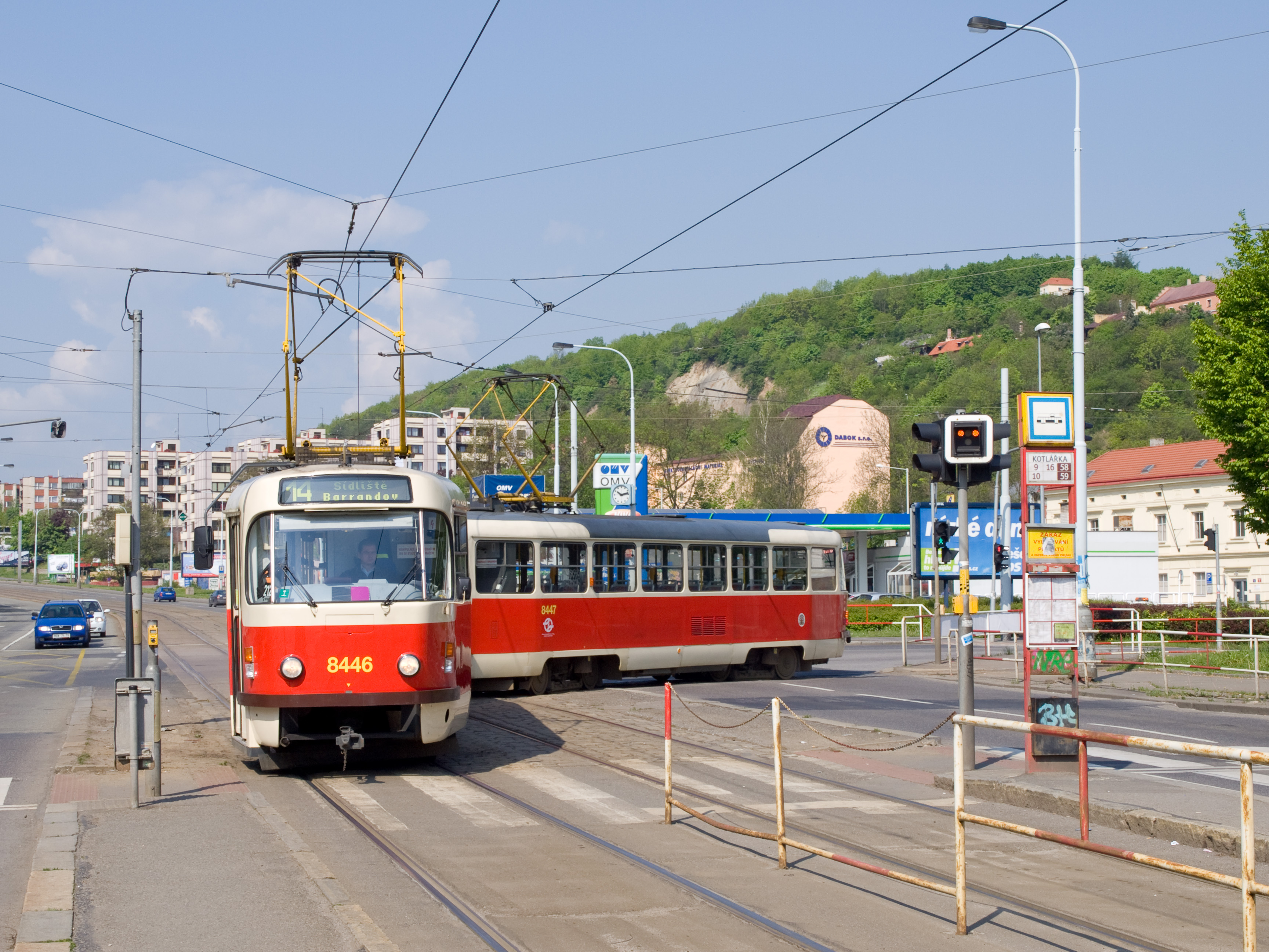 Typ vozu/type: Tatra T3R.P Evidenční číslo/registration number: 8446 Linka/line: 14 Zastávka(y)/stop(s): Kotlářka – Poštovka Trať/track: Kotlářka – Sídliště Řepy Změny v linkovém vedení způsobeny Pražským mezinárodním maratonem 2010